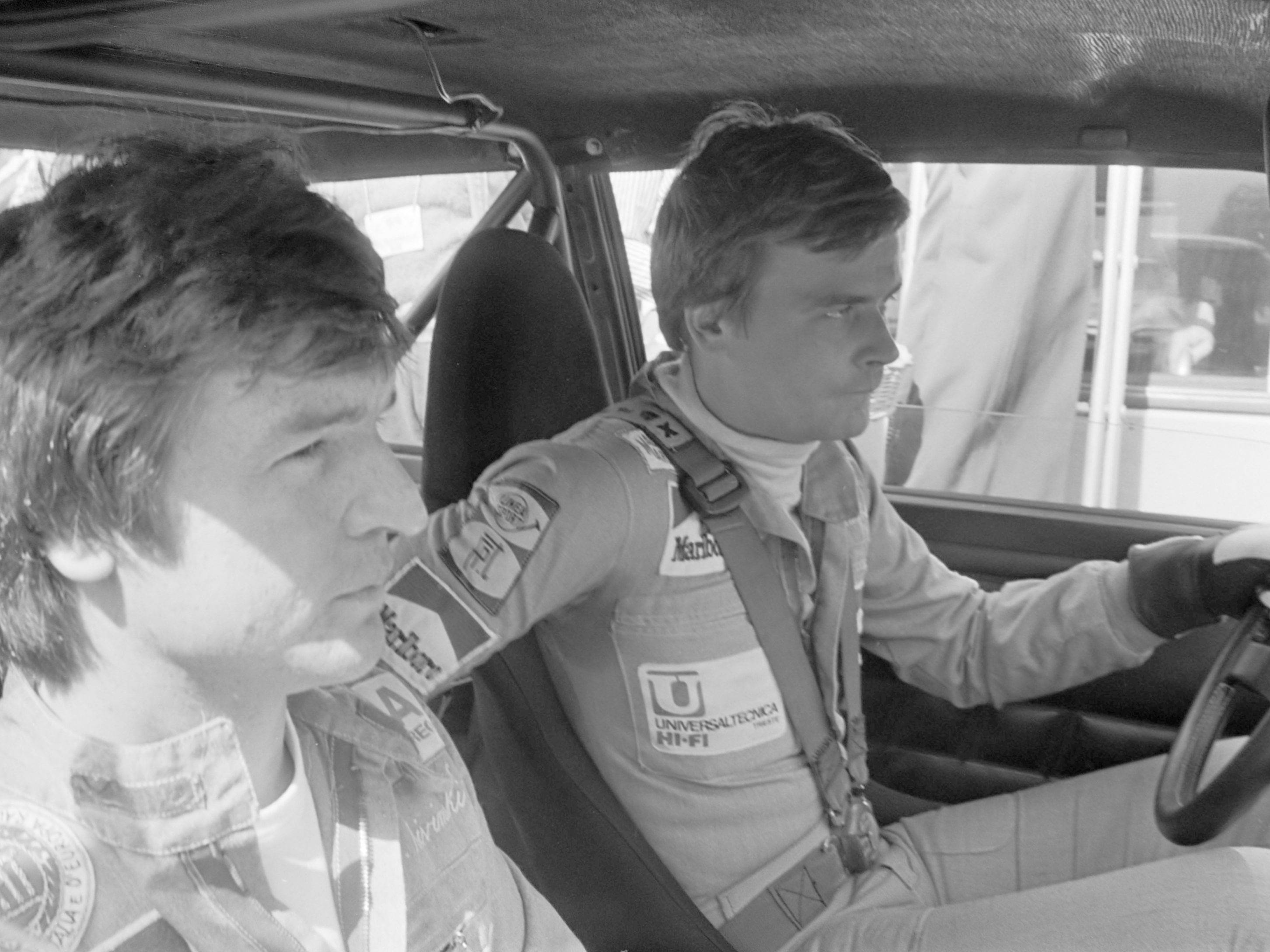 Start Tulpenralley in Rotterdam; Finnen Kivimaki (links) en Alen (rechts) in auto 23 april 1976